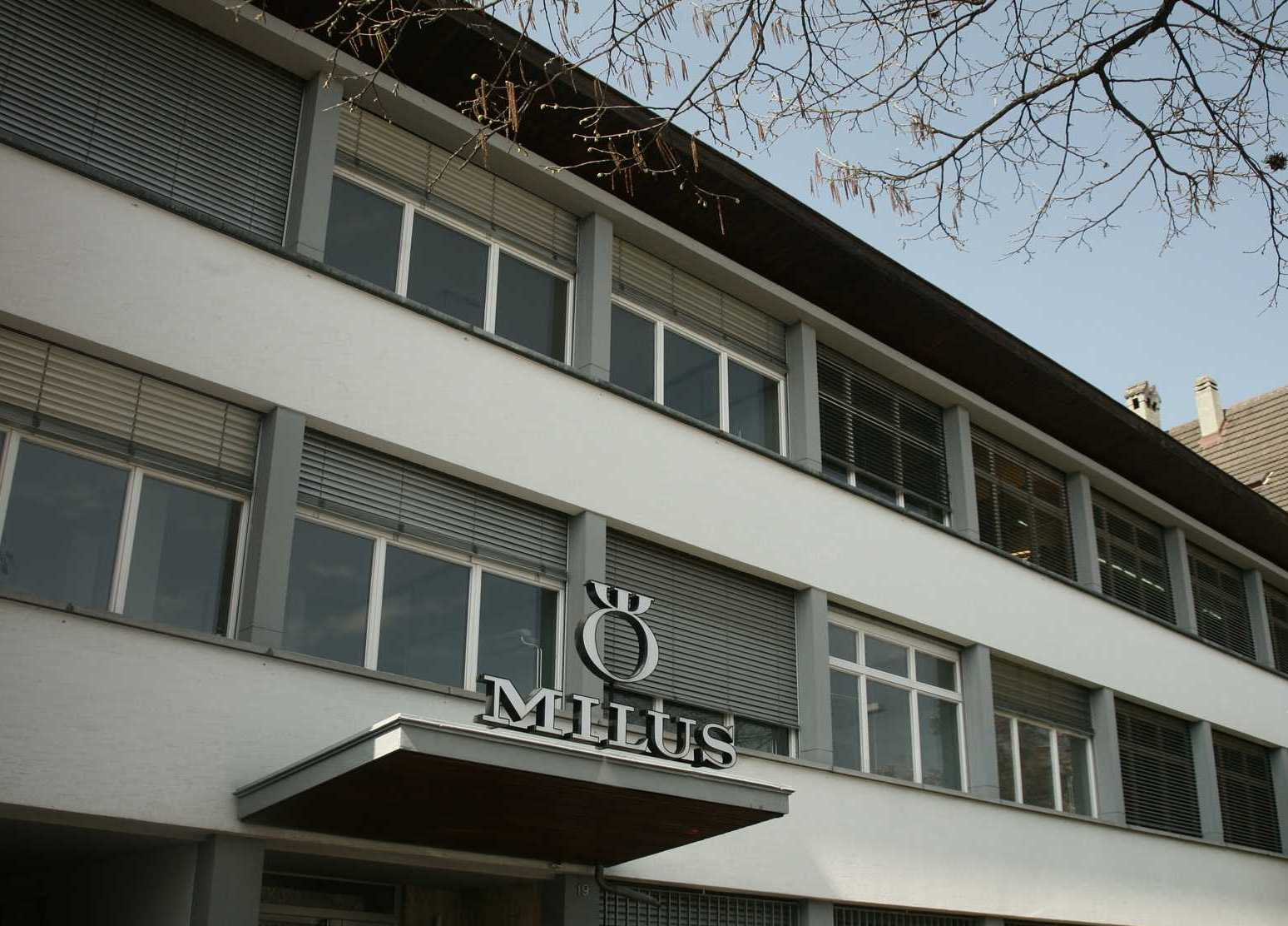 Route de Reuchenette 19, 2502 Bienne, Suisse